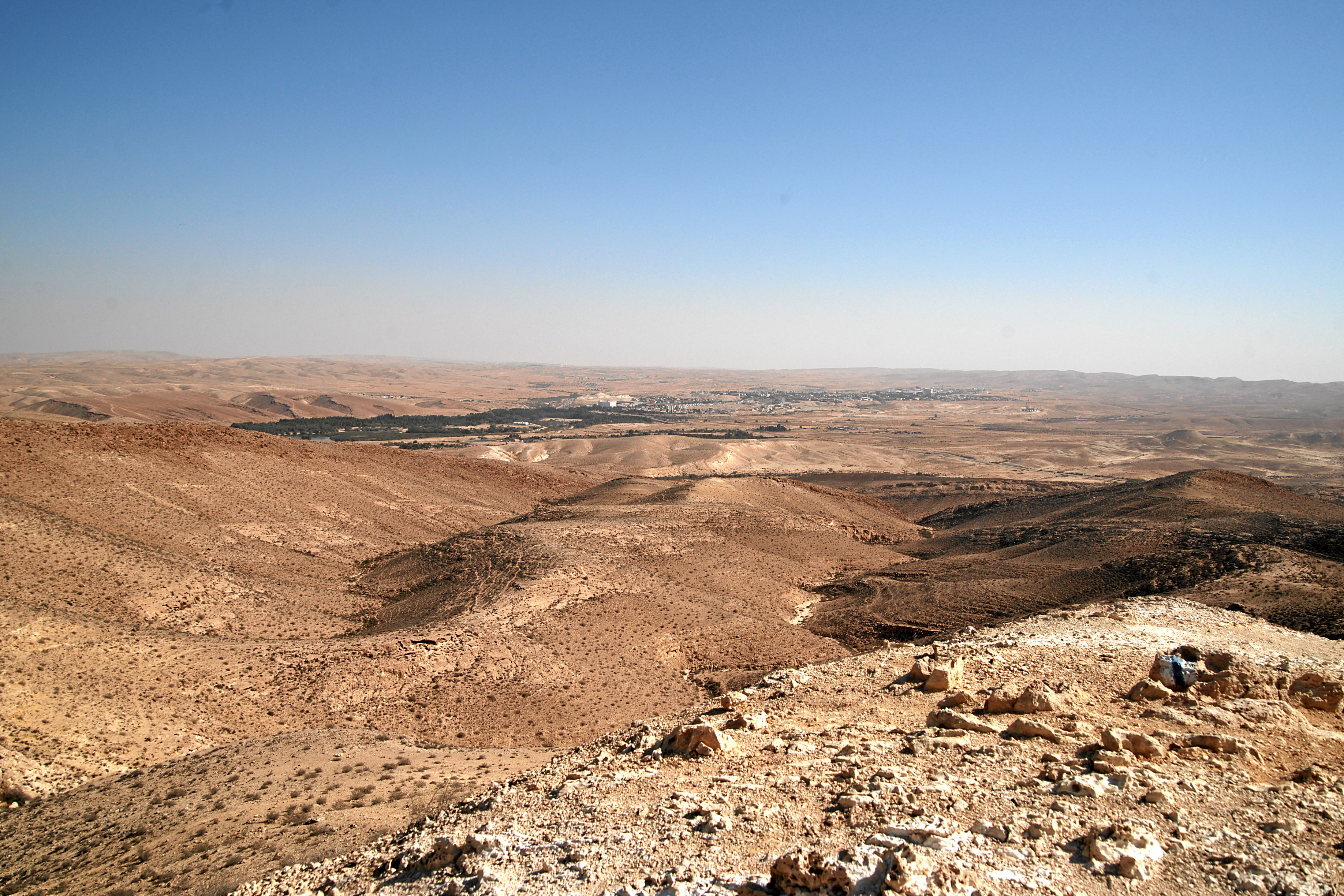 Blick nach Yeruham